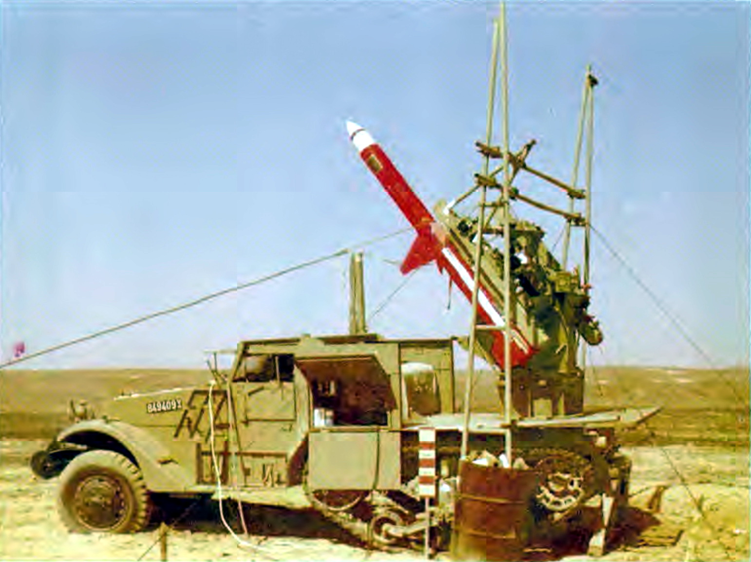 מערכת טילים פוטיפר הנושאת טיל אוויר-קרקע AGM-45 שרייק.